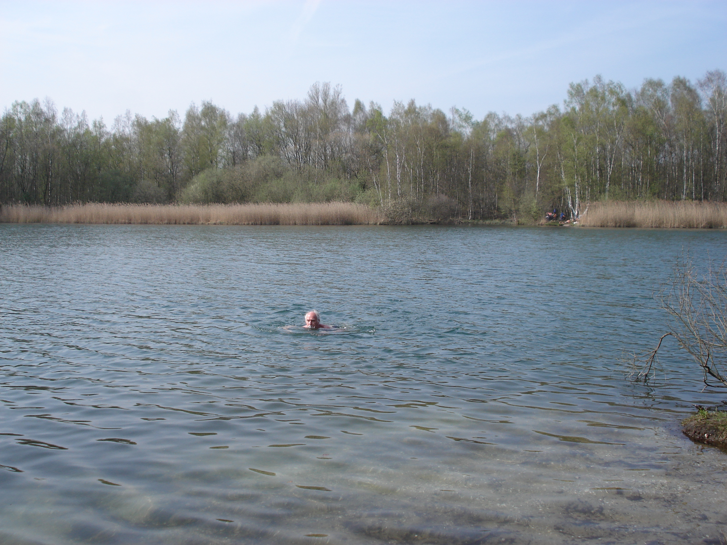 Venekotensee/Germany